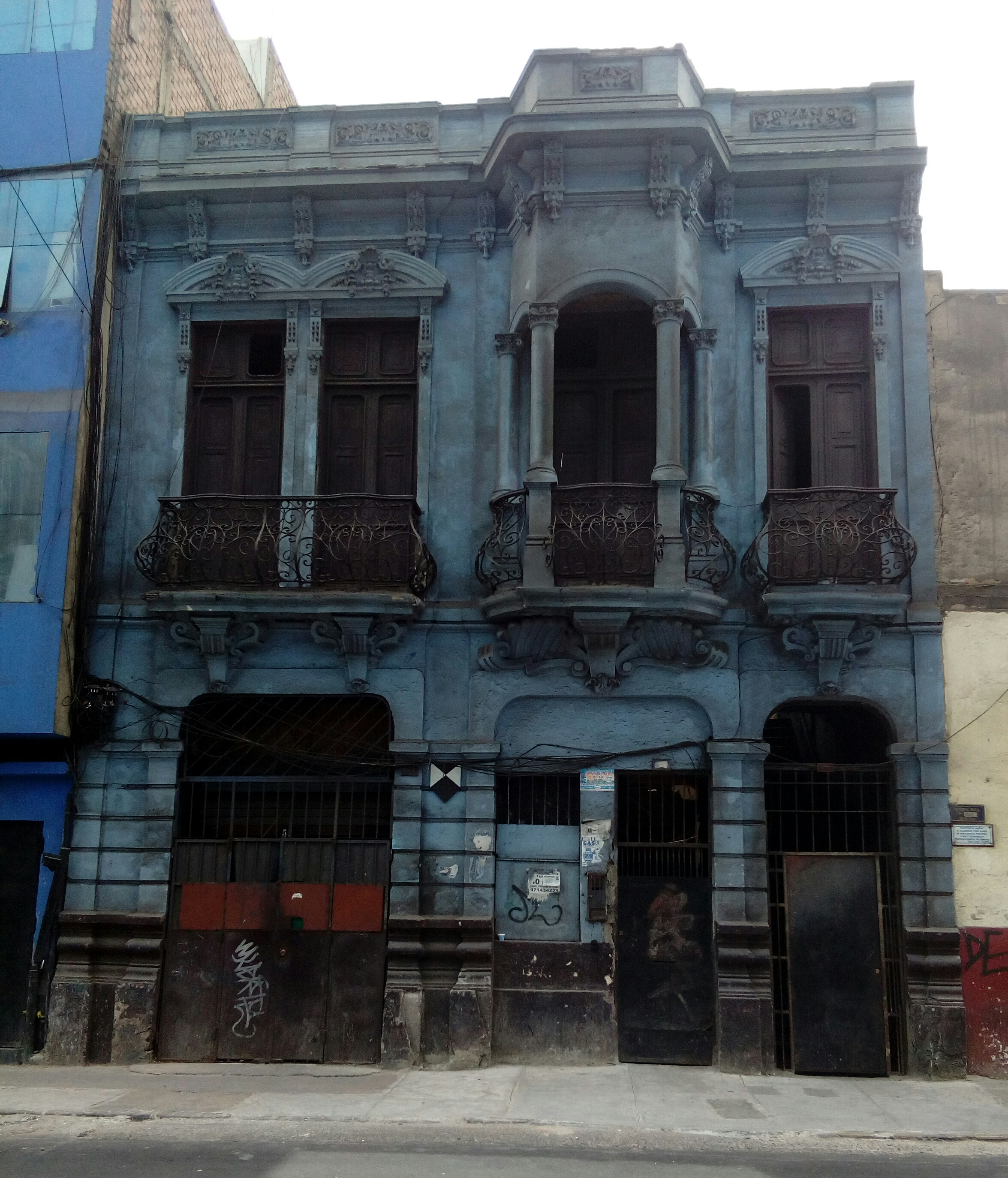 Casa ubicada en el Jirón Huanta Nº 840, lugar donde ocurrió la masacre de Barrios Altos.